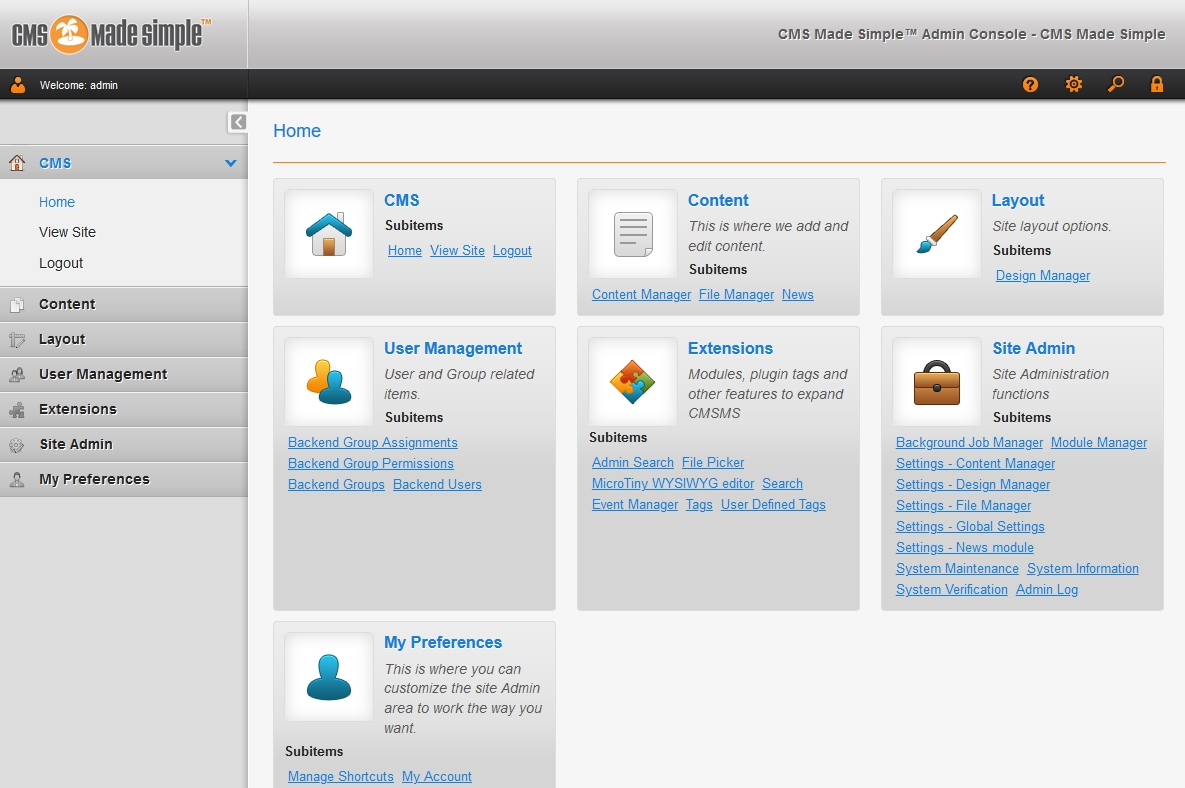 Ce fichier représente l'interface d'administration de CMS Made Simple.